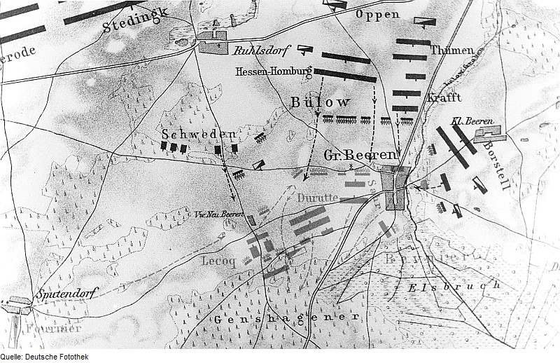 Original image description from the Deutsche Fotothek Großbeeren. Plan "Zu den Gefechten bei Großbeeren und Blankenfelde am 23. Aug.1813", aus: Friedrich, Rudolf: Die Befreiungskriege 1813-1815, 1912